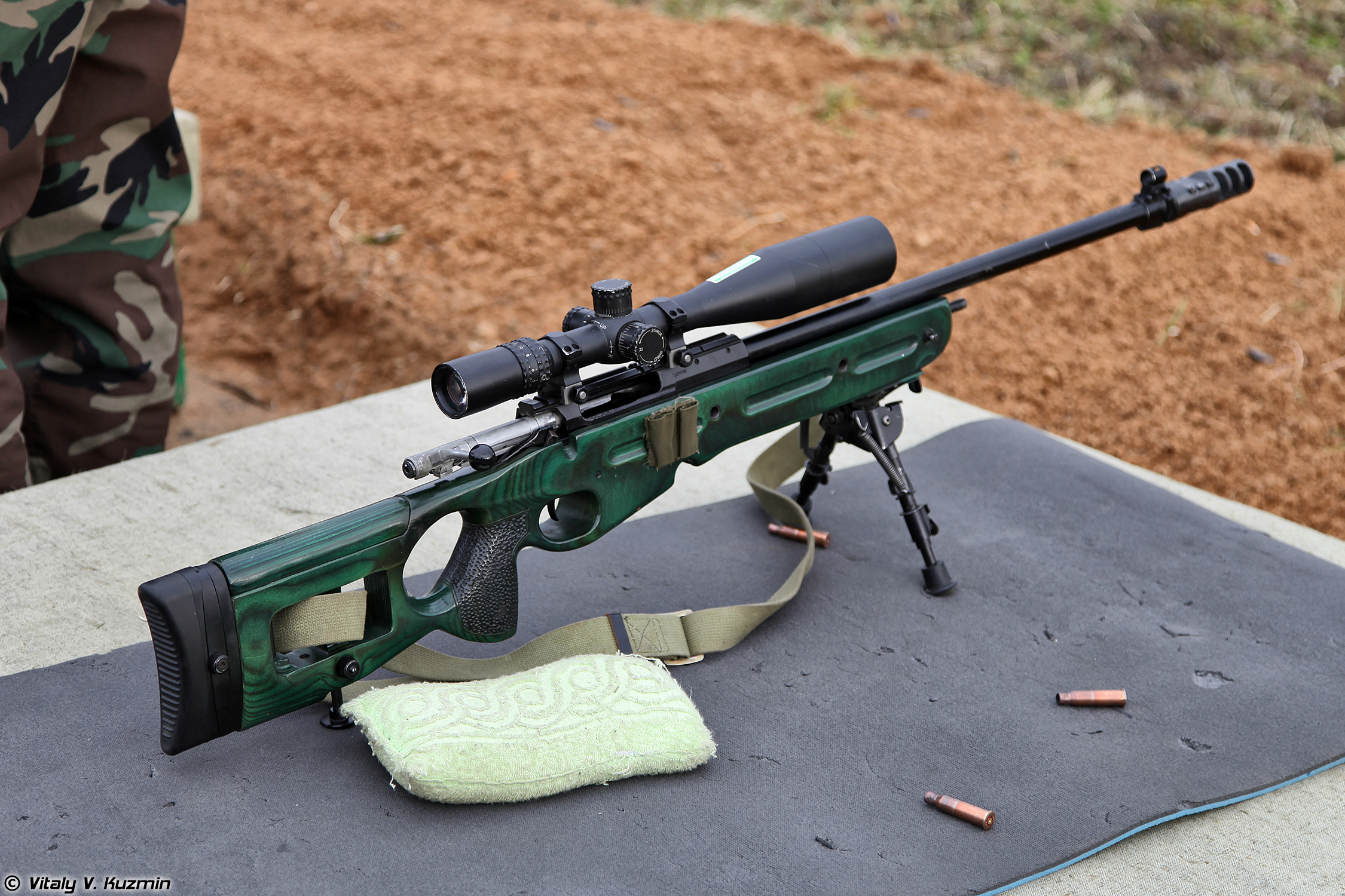 Снайперская винтовка СВ-98 (SV-98 sniper rifle)